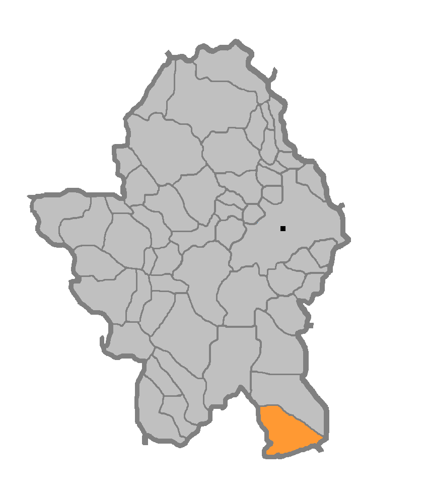 Мјесна заједница Бочац